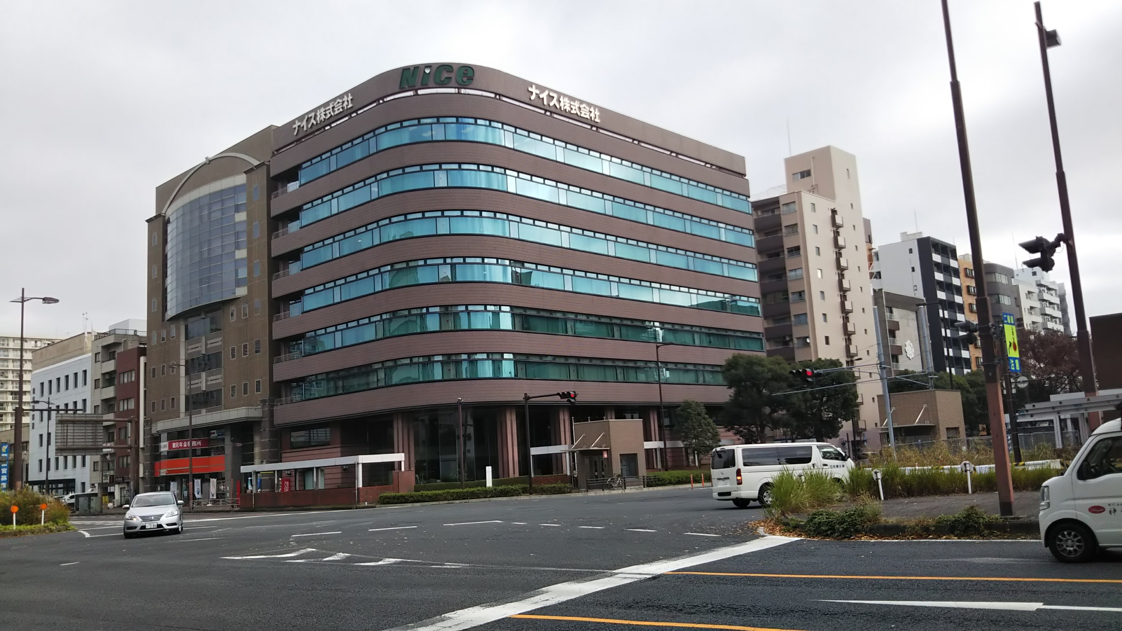 横浜市鶴見区、すてきナイスグループ本社ビル